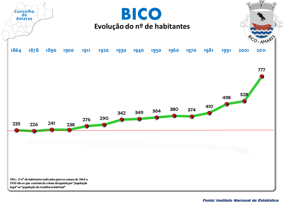 Censo 2011